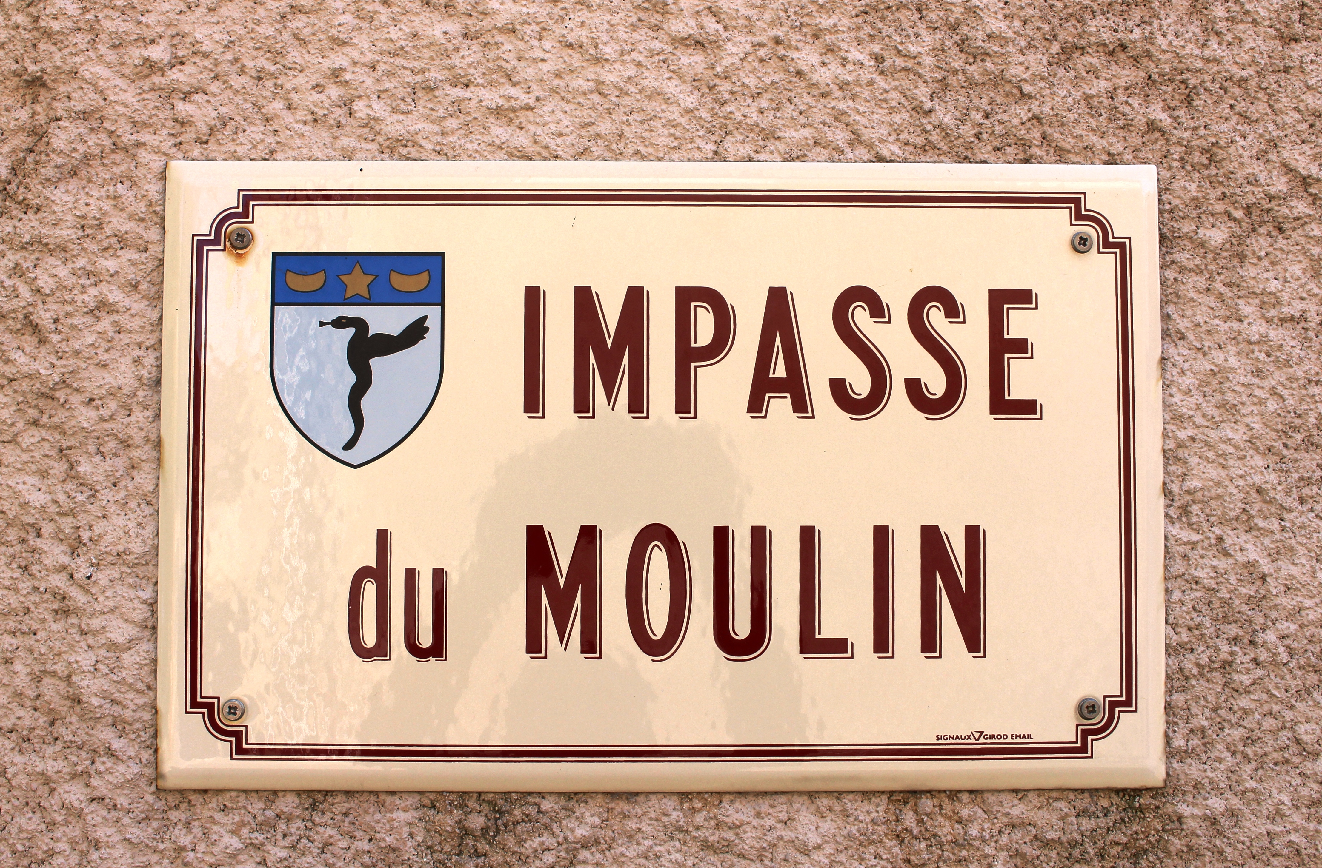 Rue du village de Hiis (Hautes-Pyrénées)